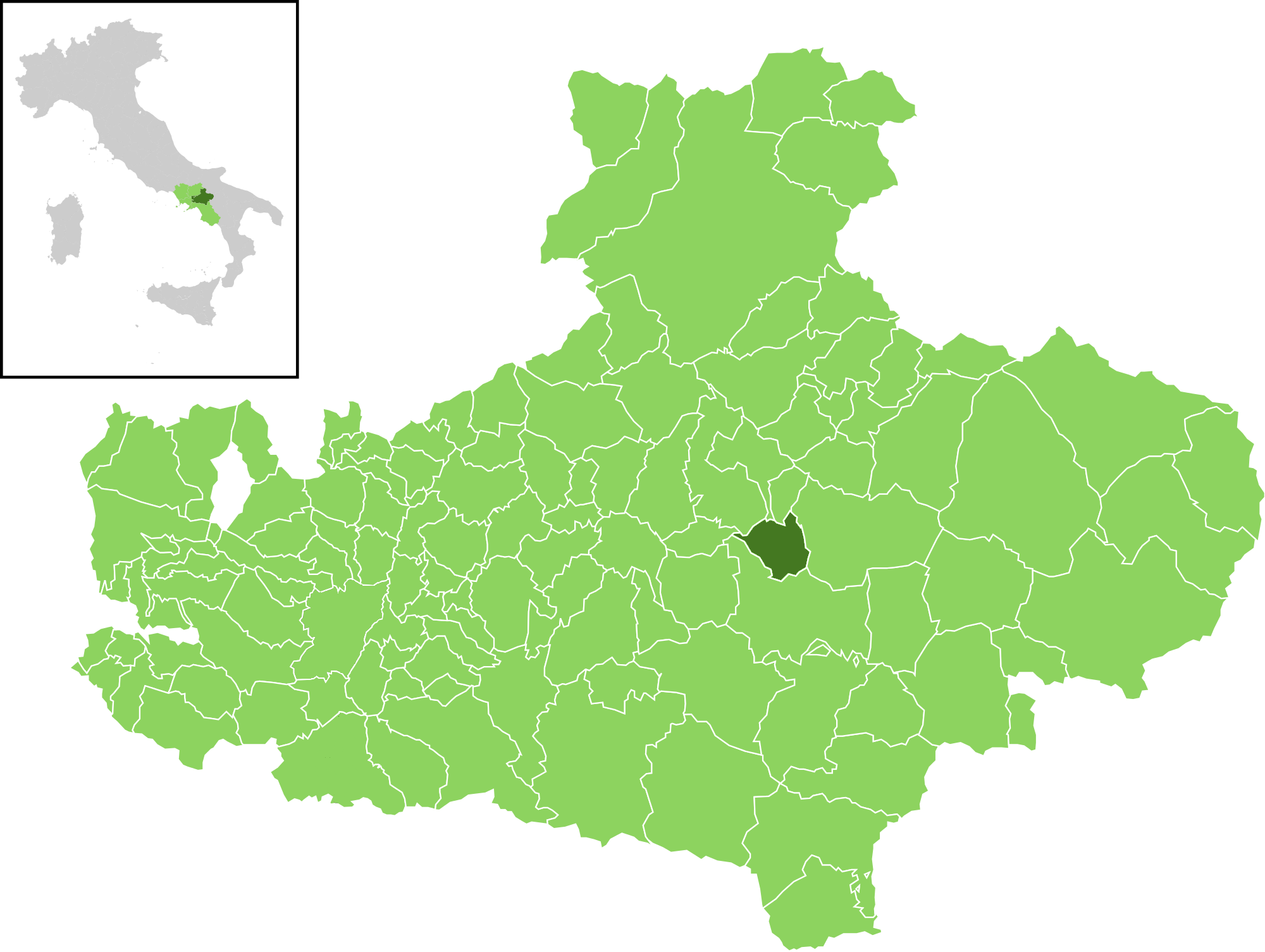 Posizione del comune all'interno della provincia di Avellino